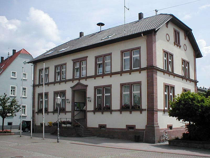 Rathaus in Aglasterhausen